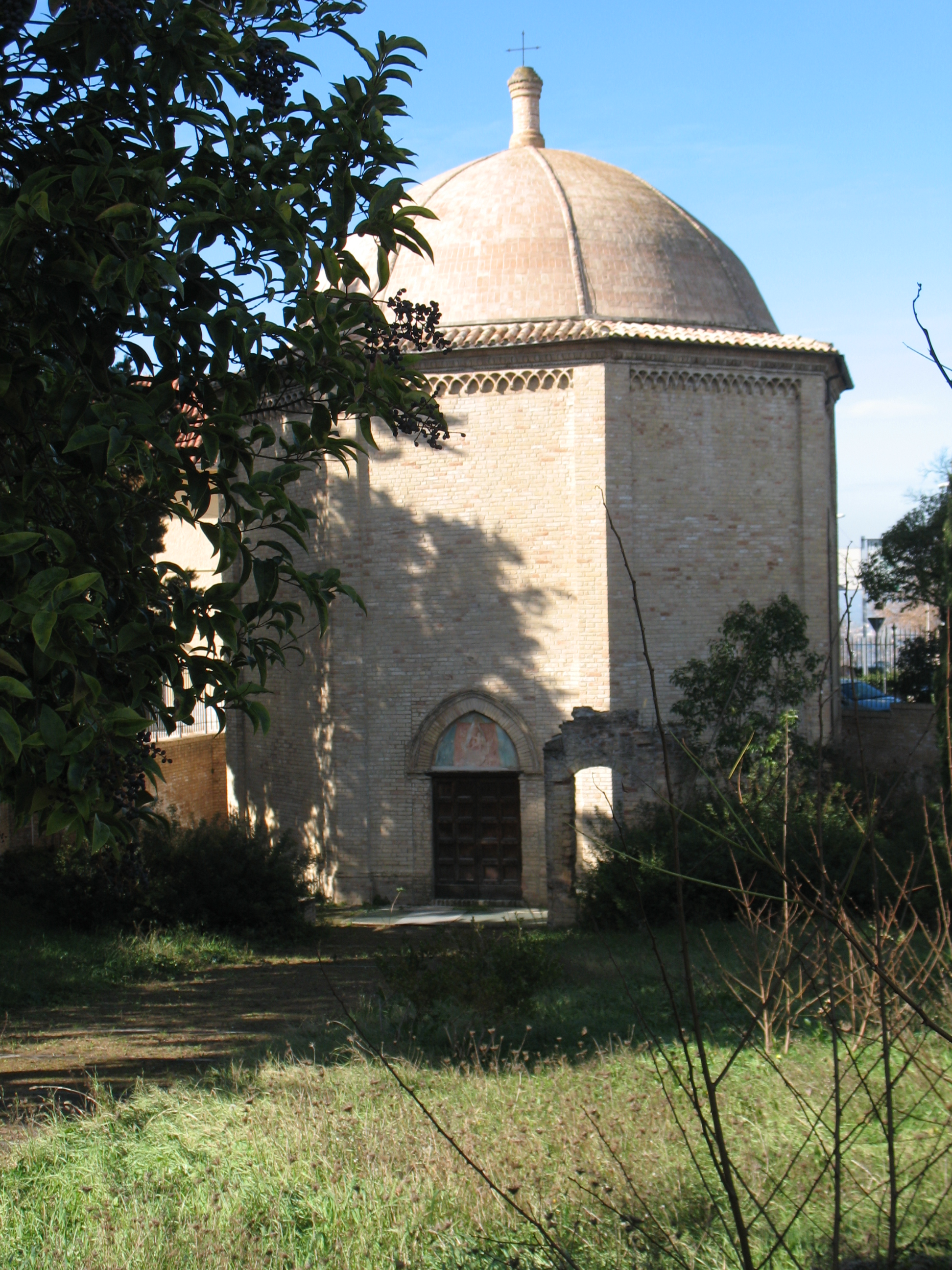 La Chiesa di Santa Maria (nel quartiere teatino del Tricalle) è una delle più antiche della città. E' caratteristica anche per il fatto di essere a pianta ottagonale e di essere stata costruita su un'altra chiesa medievale, che a sua volta occupò lo spazio di un edificio più antico e di origine incerta.